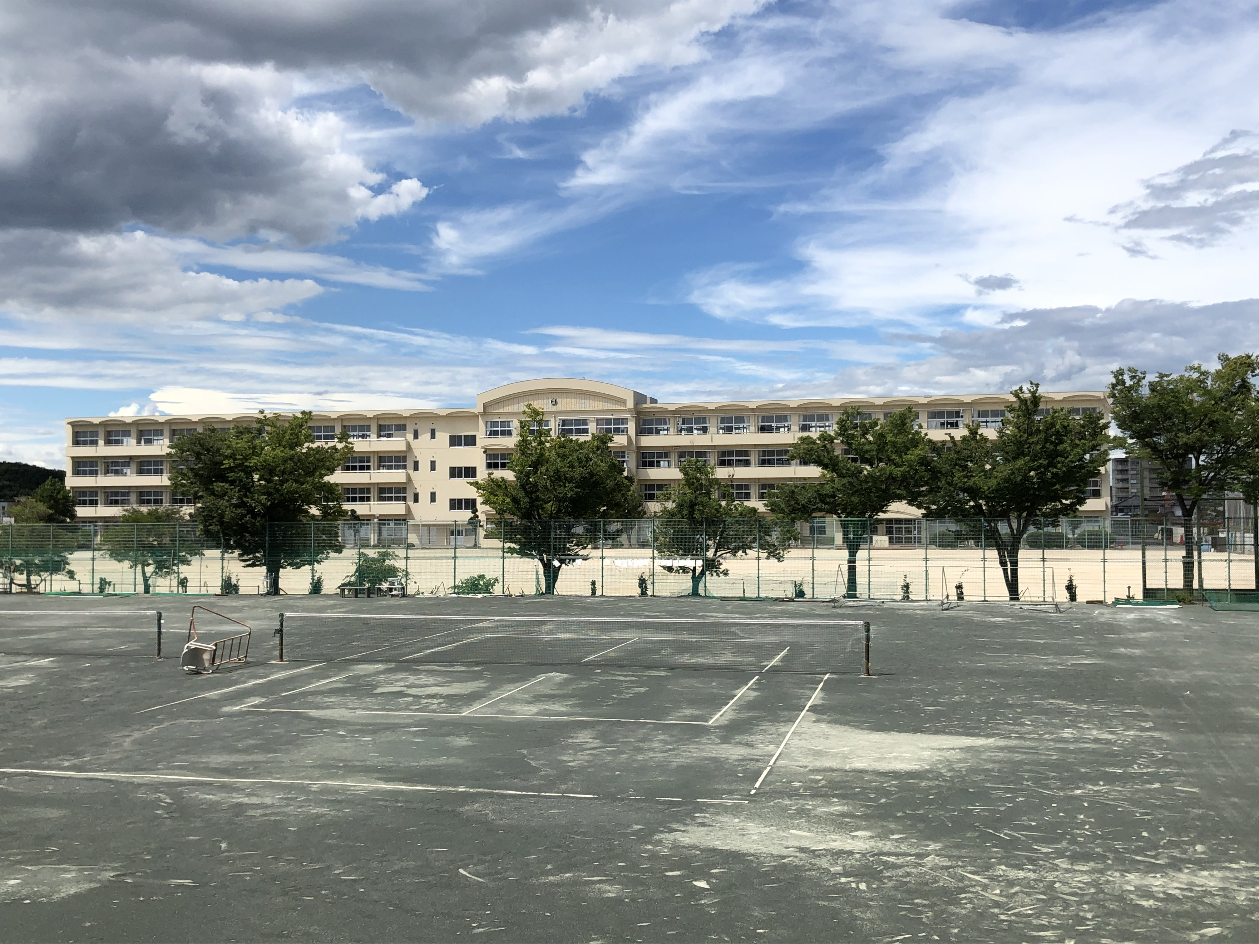 岡崎市立竜南中学校（岡崎市緑丘）